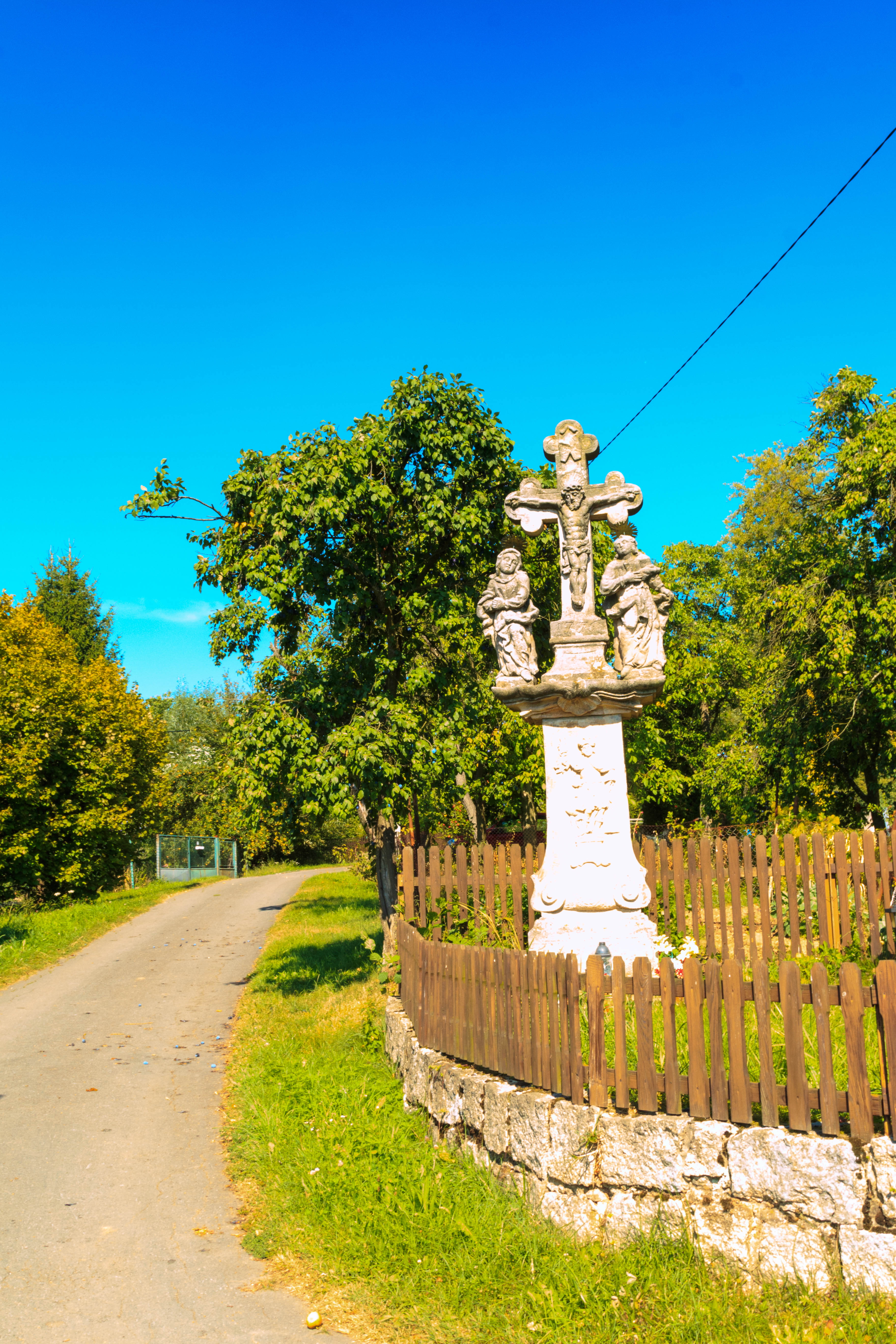 Krucifix, uprostřed vsi, Kotelsko.